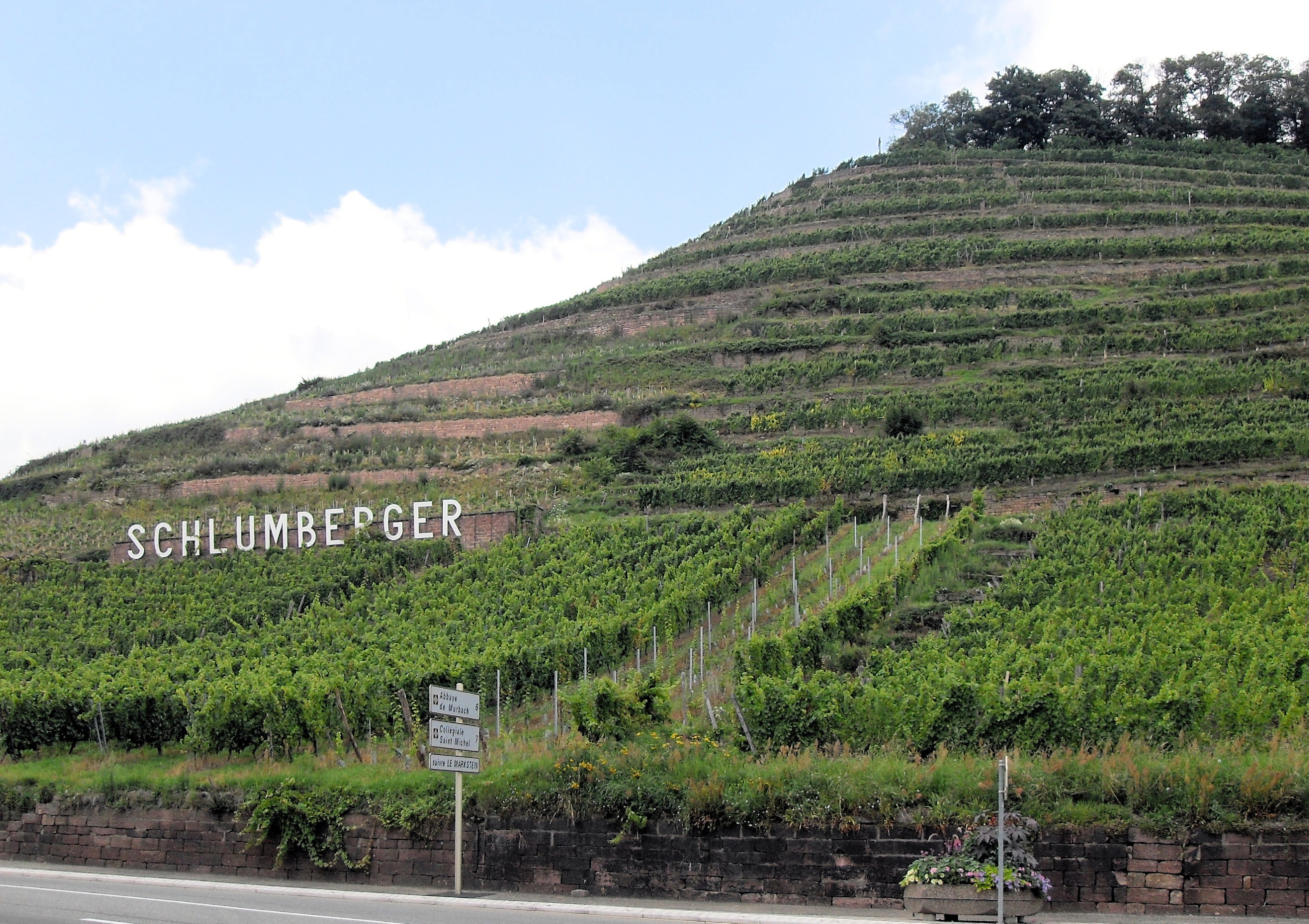 Les Grand Crus du Kitterlé et du Saering à Guebwiller